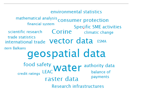 Populární termíny